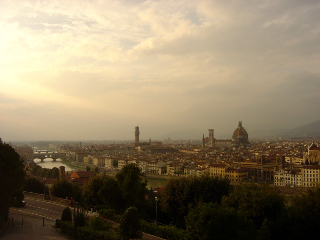 Panoramica, Firenze, Italy.